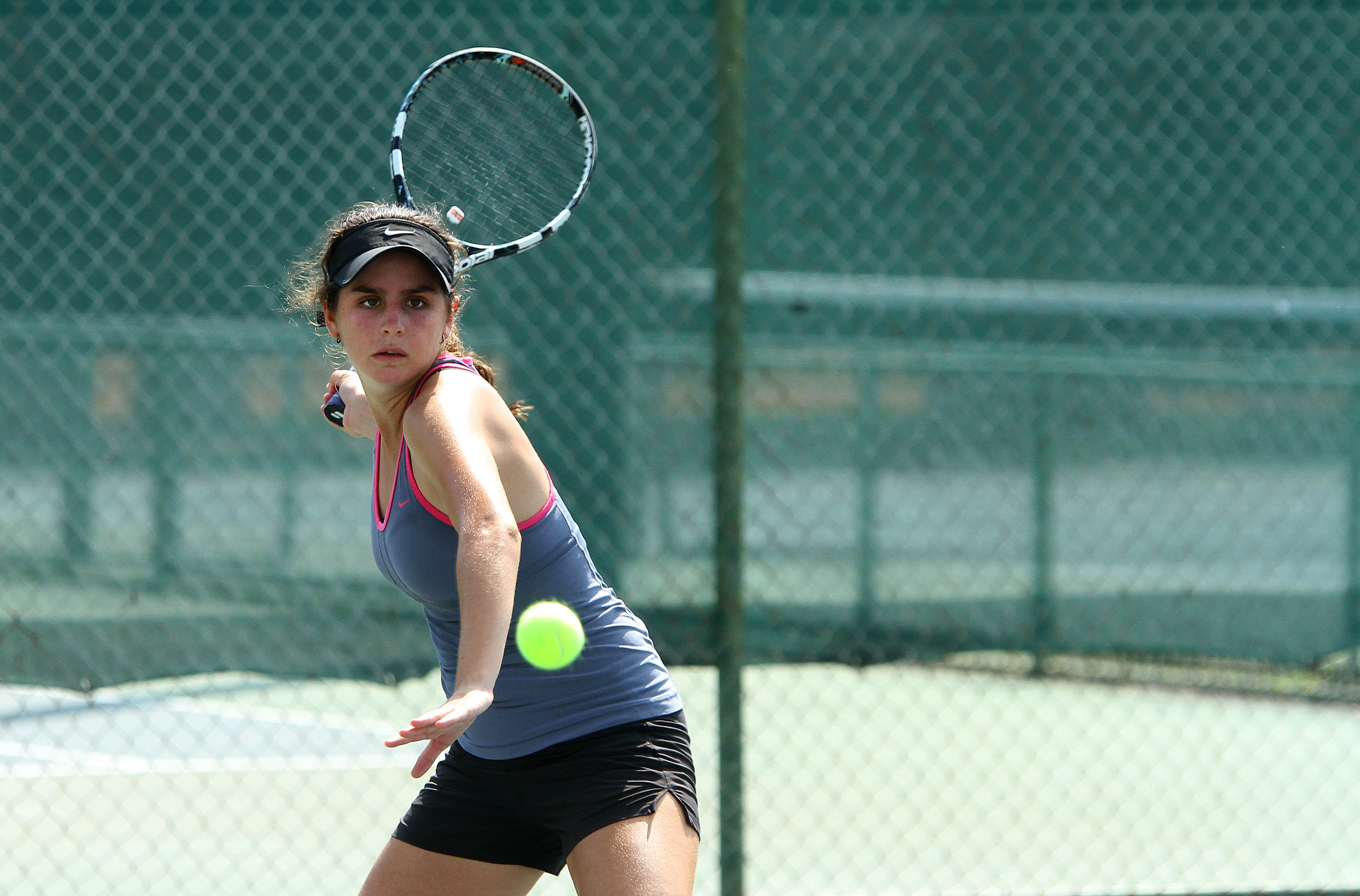 Guayaquil, 19 de jun del 2015 (Andes).-La tenista Rafaella Gómez, integra el equipo de Ecuador del Grupo II de la zona americana de la Fed Cup por BNP Paribas a disputarse en República Dominicana. Foto: César Muñoz/Andes